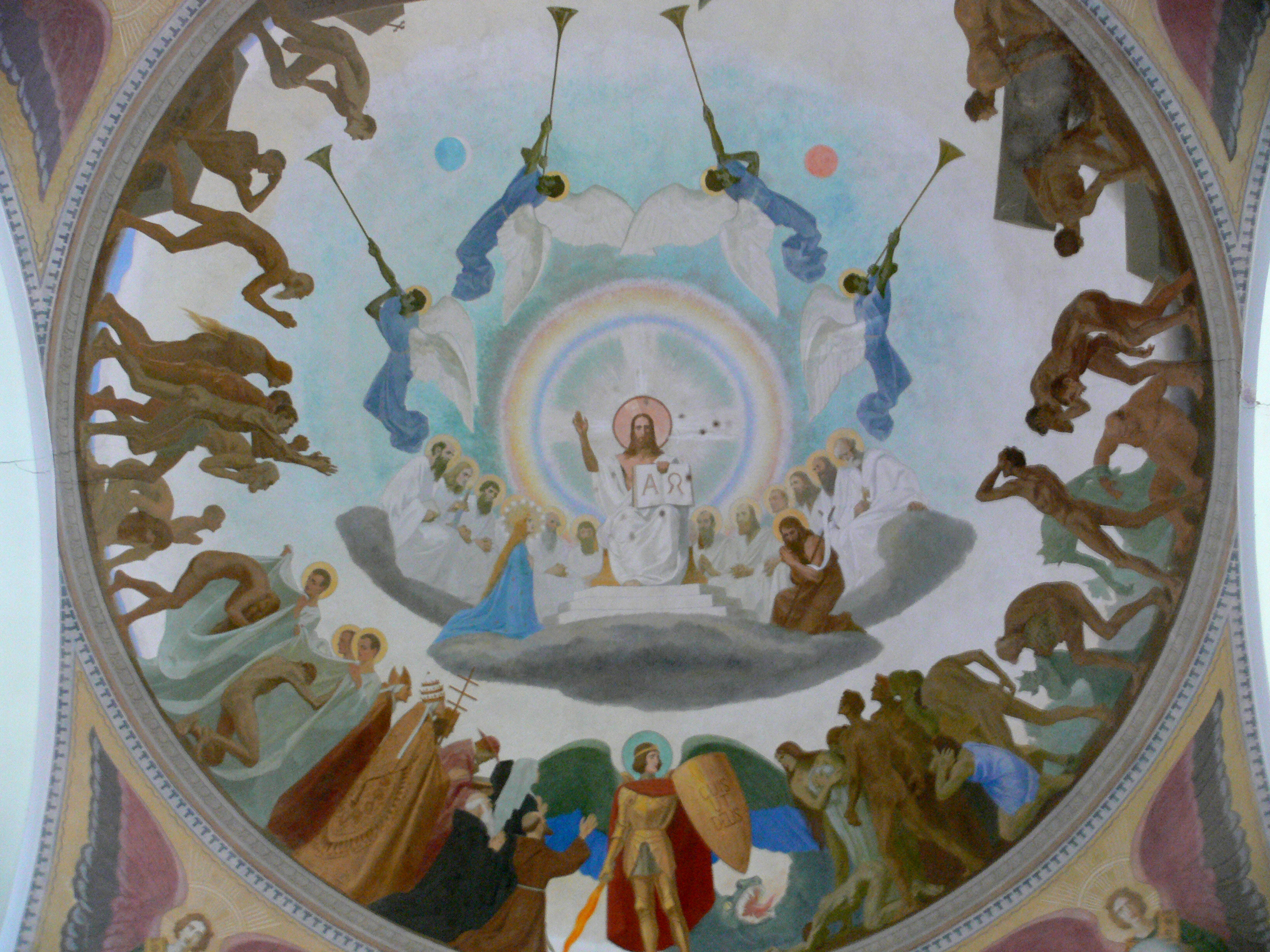 Kath. Pfarrkirche St. Martinus, Hauerz, Stadt Bad Wurzach Deckengemälde von Gebhard Fugel über der Vierung, 1921